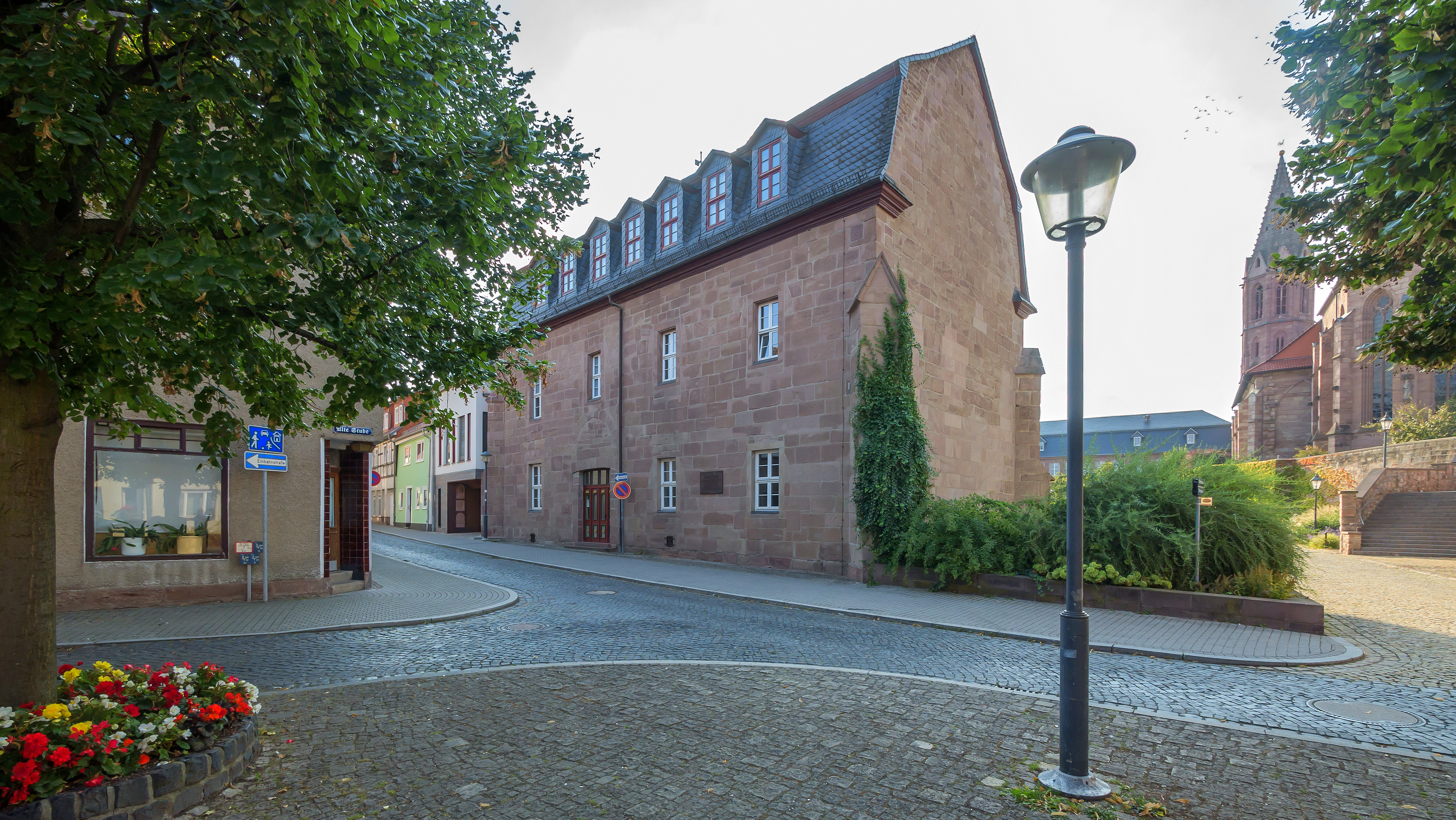 Heilbad Heiligenstadt Ratsgasse 9 Altes Rathaus Thomas-Müntzer-Gedenktafel 1